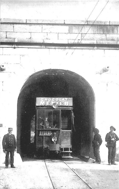 Début XXe siècle, tramway sortant par la porte des Alpes en direction d'Eybens (ligne Grenoble-Eybens)